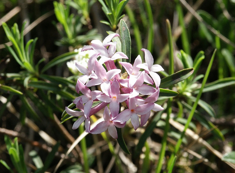 Daphne striata, Ausserfern, Österreich